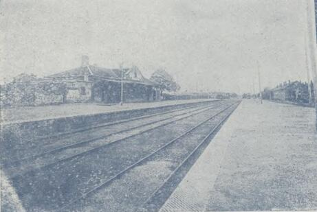 题名： 湘鄂段：粵漢鐵路湘鄂段岳州車站：[照片] 文献来源： 《铁展》 出版时间： 1934 年 卷期(页)： [ 第1期 ，11页 ] 中图分类号： F76